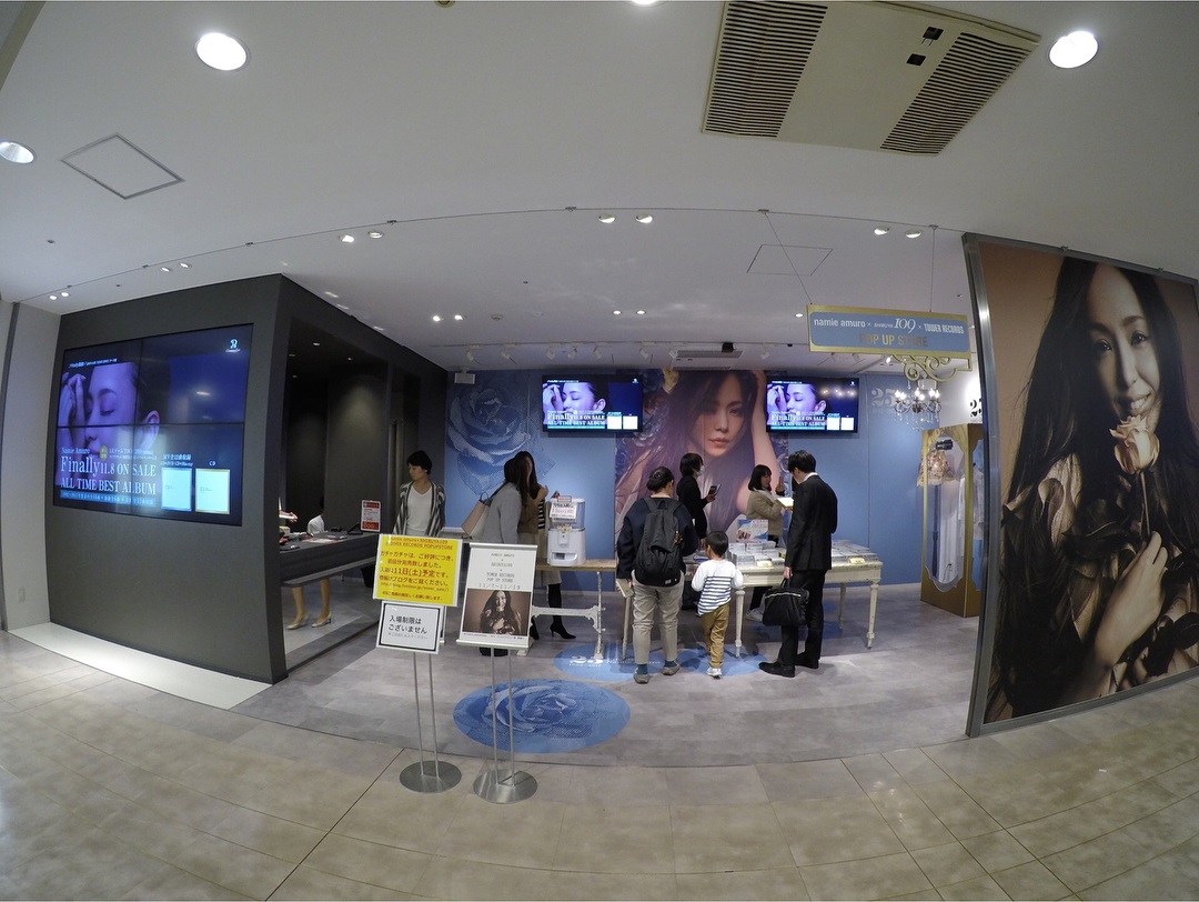 SHIBUYA 109の店舗内（特設コーナー）